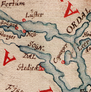 Sjøkart fra 1610 over kysten fra Karmøy til Geirangerfjorden. Håndtegnet i ukjent målestokk. Original kartstørrelse ca 74 cm x 31 cm. Et eksemplar befinner seg hos Statens kartverk Sjø i Stavanger.